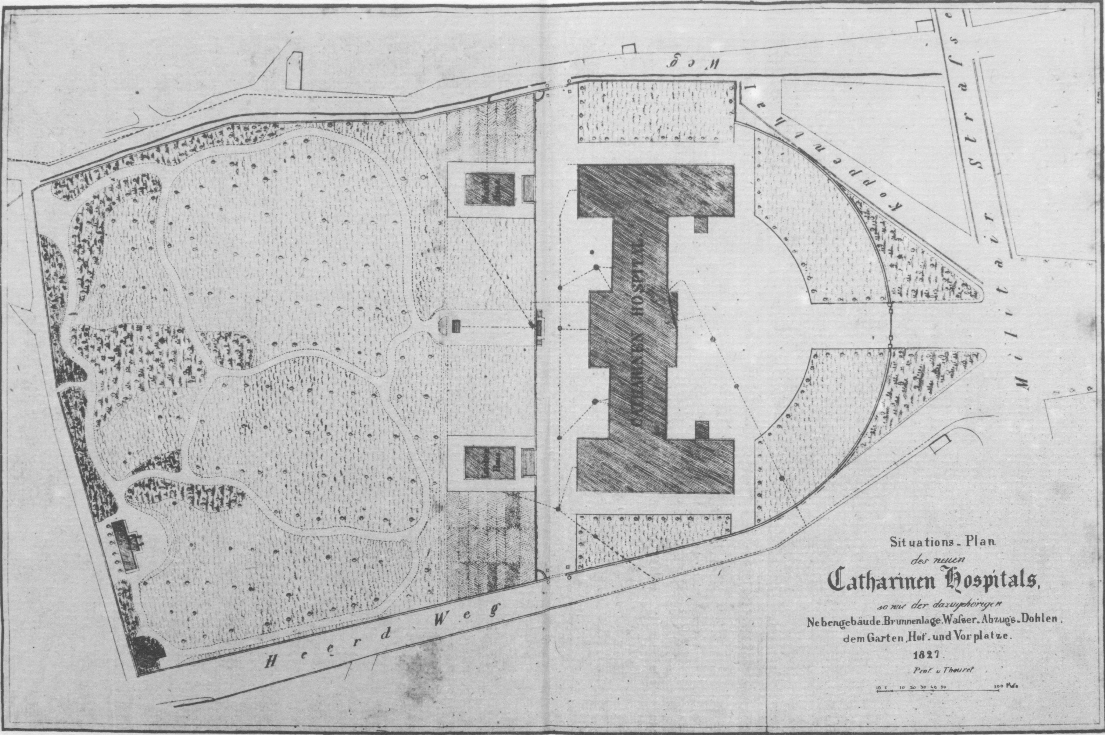 „Situations-Plan des neuen Catharinen Hospitals und so wie der dazugehörigen Nebengebäude, Brunnenanlage,Wasser-Abzugs-Dohlen, dem Garten, Hof- und Vorplatze“ von Nikolaus Friedrich von Thouret, 1827.